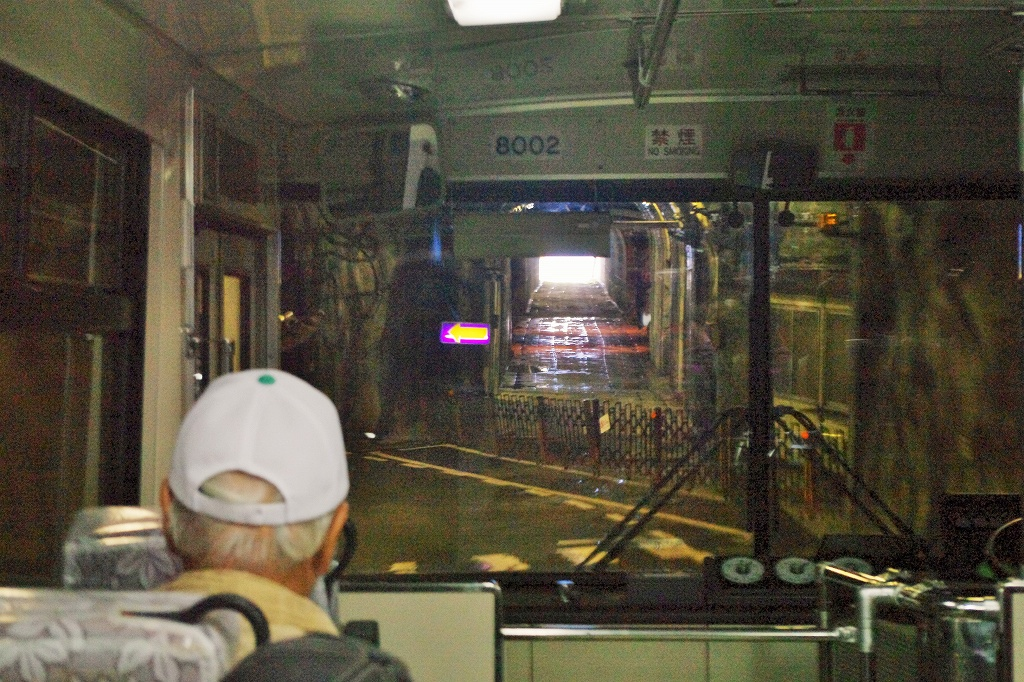 雷殿駅01